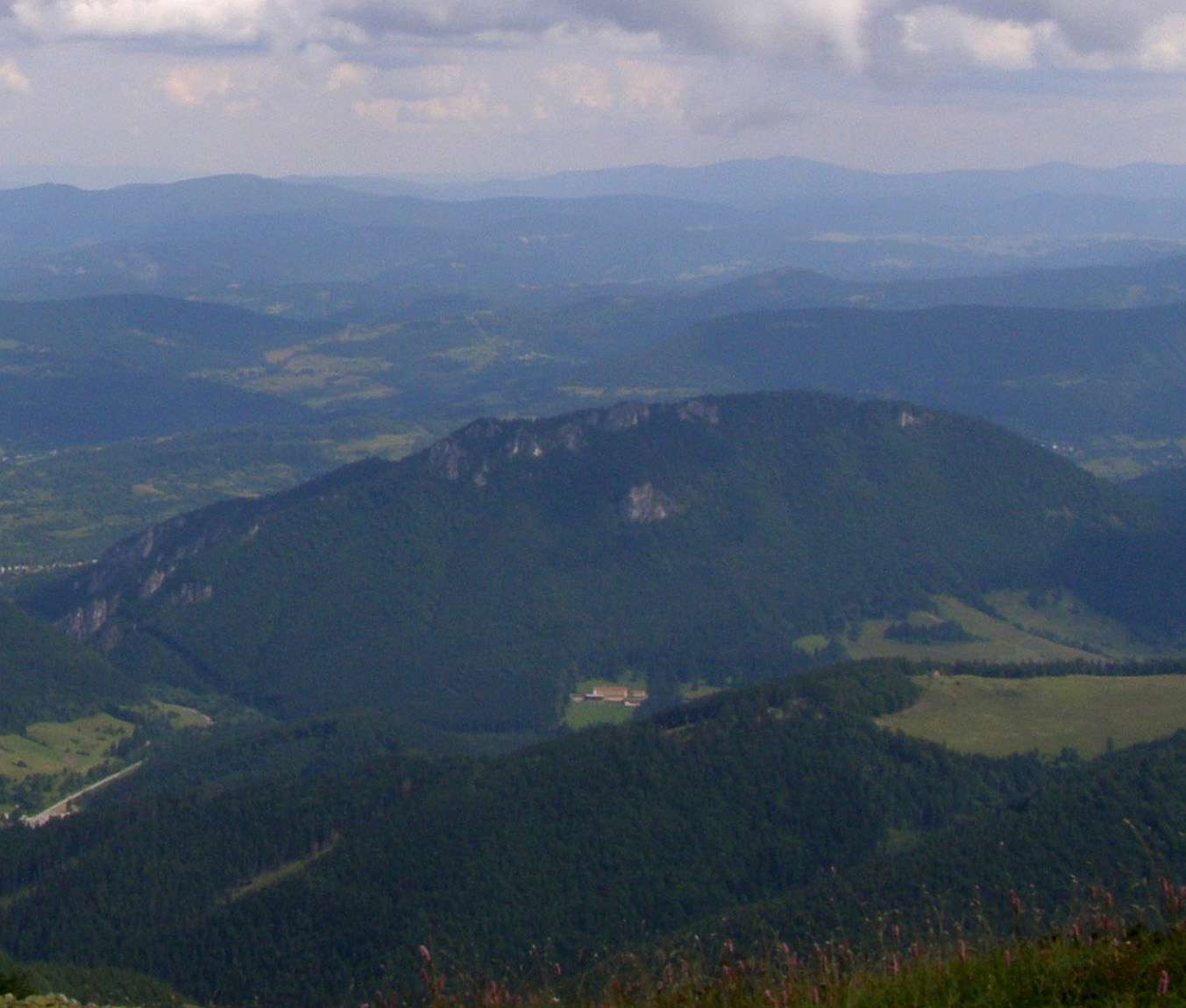 horský masív Boboty